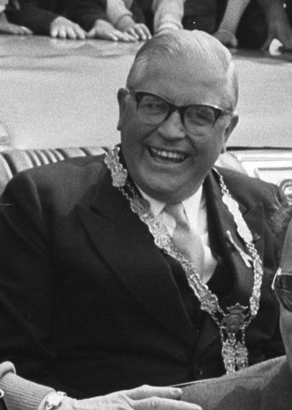 Collectie / Archief : Fotocollectie Anefo Reportage / Serie : Prins Bernhard in Waddinxveen Beschrijving : Rijtoer. Achterin burgemeester Cor van der Hooft Datum : 12 juni 1967 Locatie : Waddinxveen, Zuid-Holland Trefwoorden : bezoeken, prinsen Persoonsnaam : Bernhard (prins Nederland), Hooft, Cor van der Fotograaf : Fotograaf Onbekend / Anefo Auteursrechthebbende : Nationaal Archief Materiaalsoort : Negatief (zwart/wit) Nummer archiefinventaris : bekijk toegang 2.24.01.05 Bestanddeelnummer : 920-4027 Reacties Geplaatst door Royalfan op 08 juni 2017 - 16:31. 'Bouwdag Waddinxveen 1967' Geplaatst door Royalfan op 08 juni 2017 - 16:36. Achter de Prins de burgemeester van Waddinxveen C.A. van der Hooft.